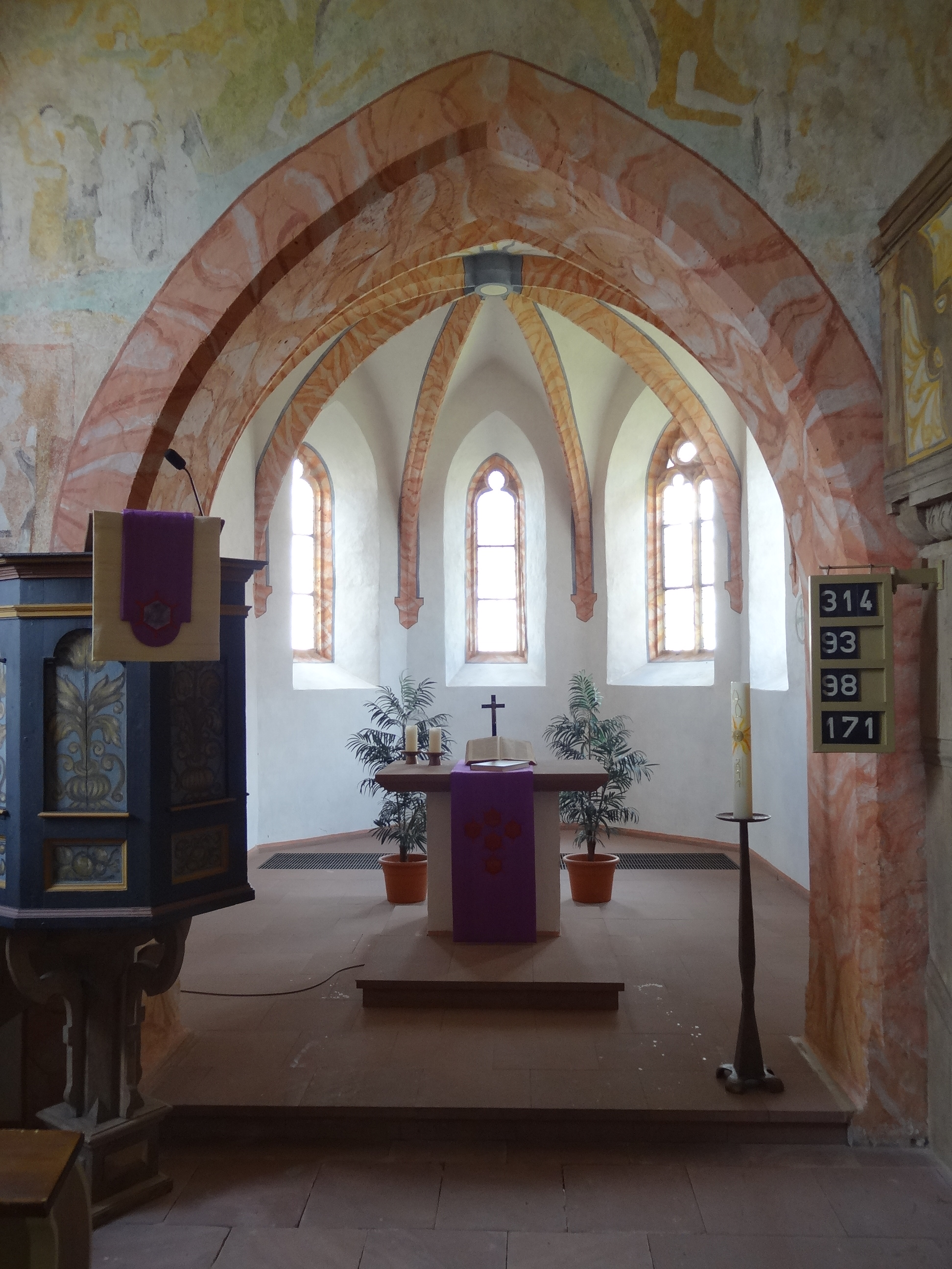 Evangelische Kirche Ober-Bessingen